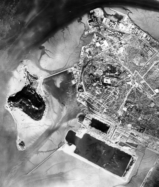 1947년 월미도 항공사진.